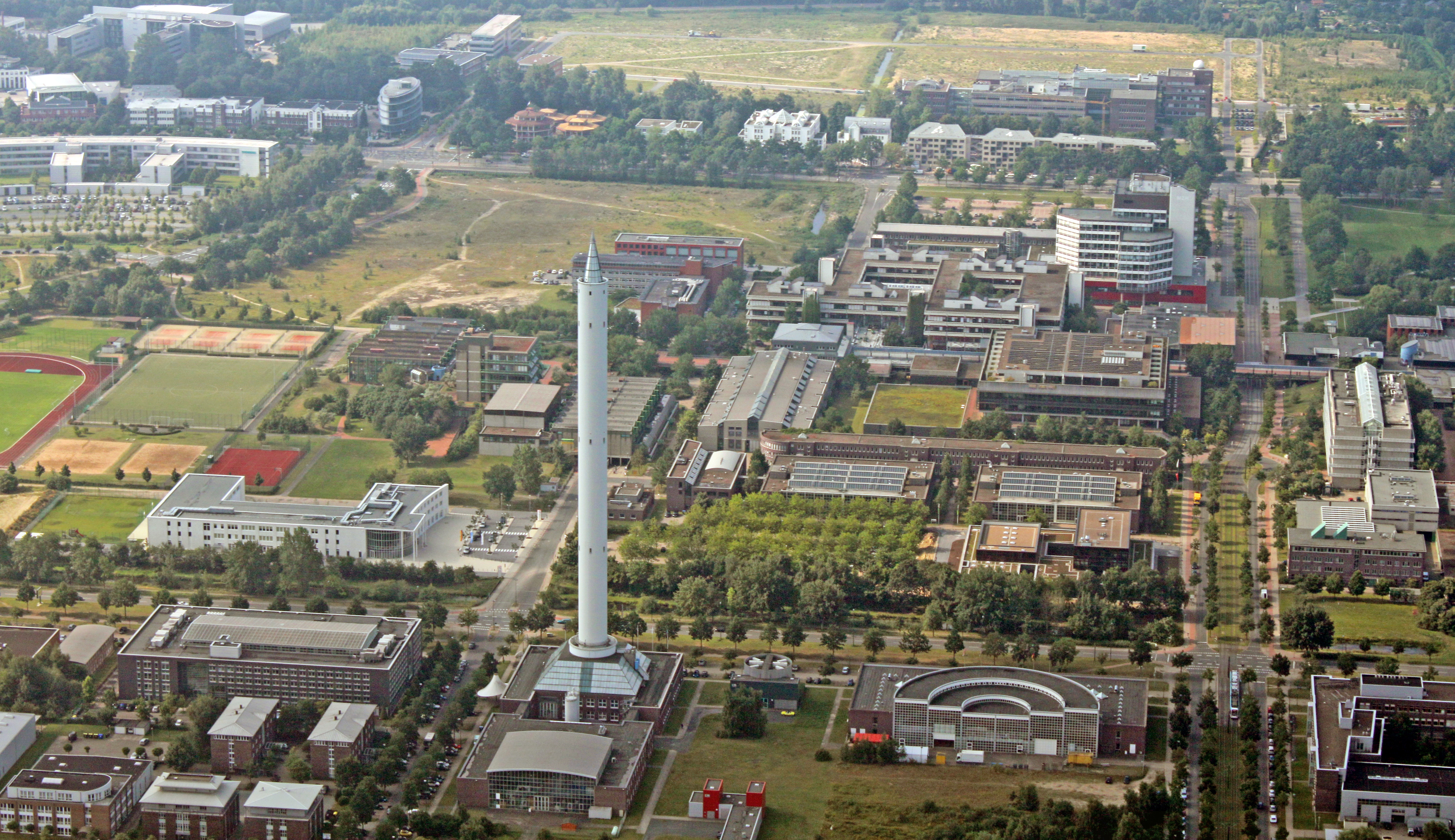 Luftaufnahme Bremen; entlang der A27; Uni Bremen; Flughöhe 500 m - unbearbeitet